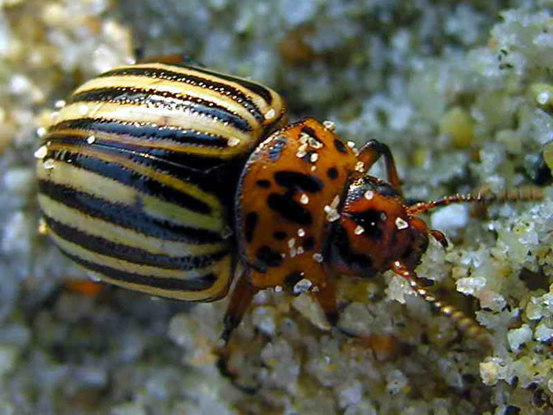 Foto tirada cunha Nikon E8800. Self made Bastabales - Galicia - Spain